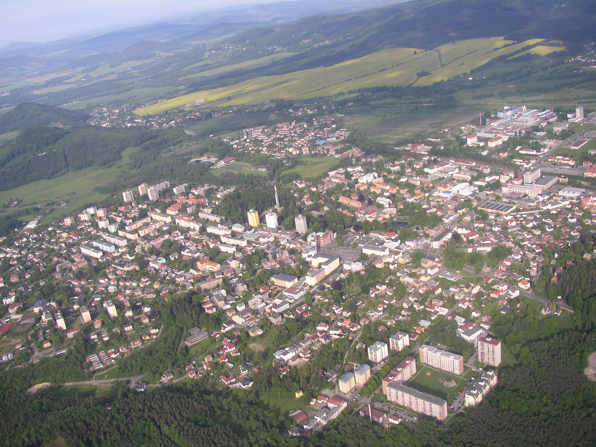 Nový Bor